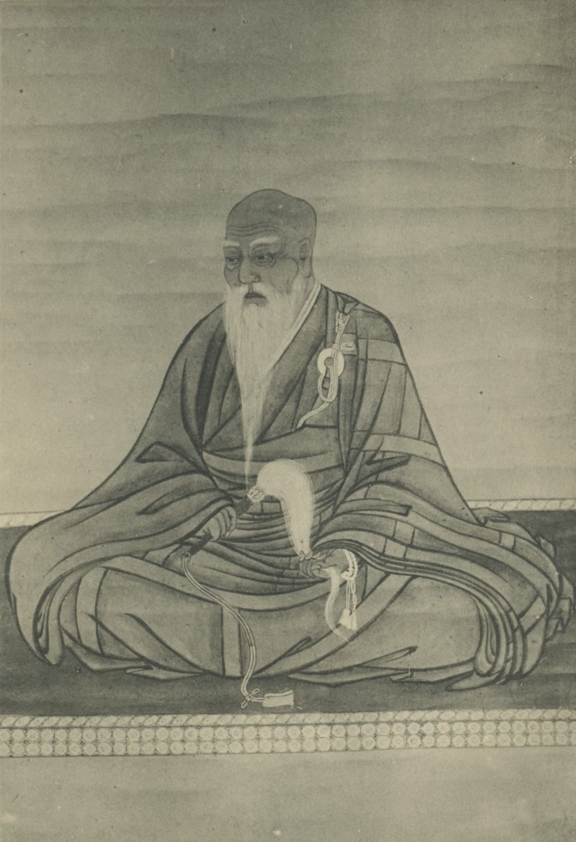 九条尚忠の肖像。